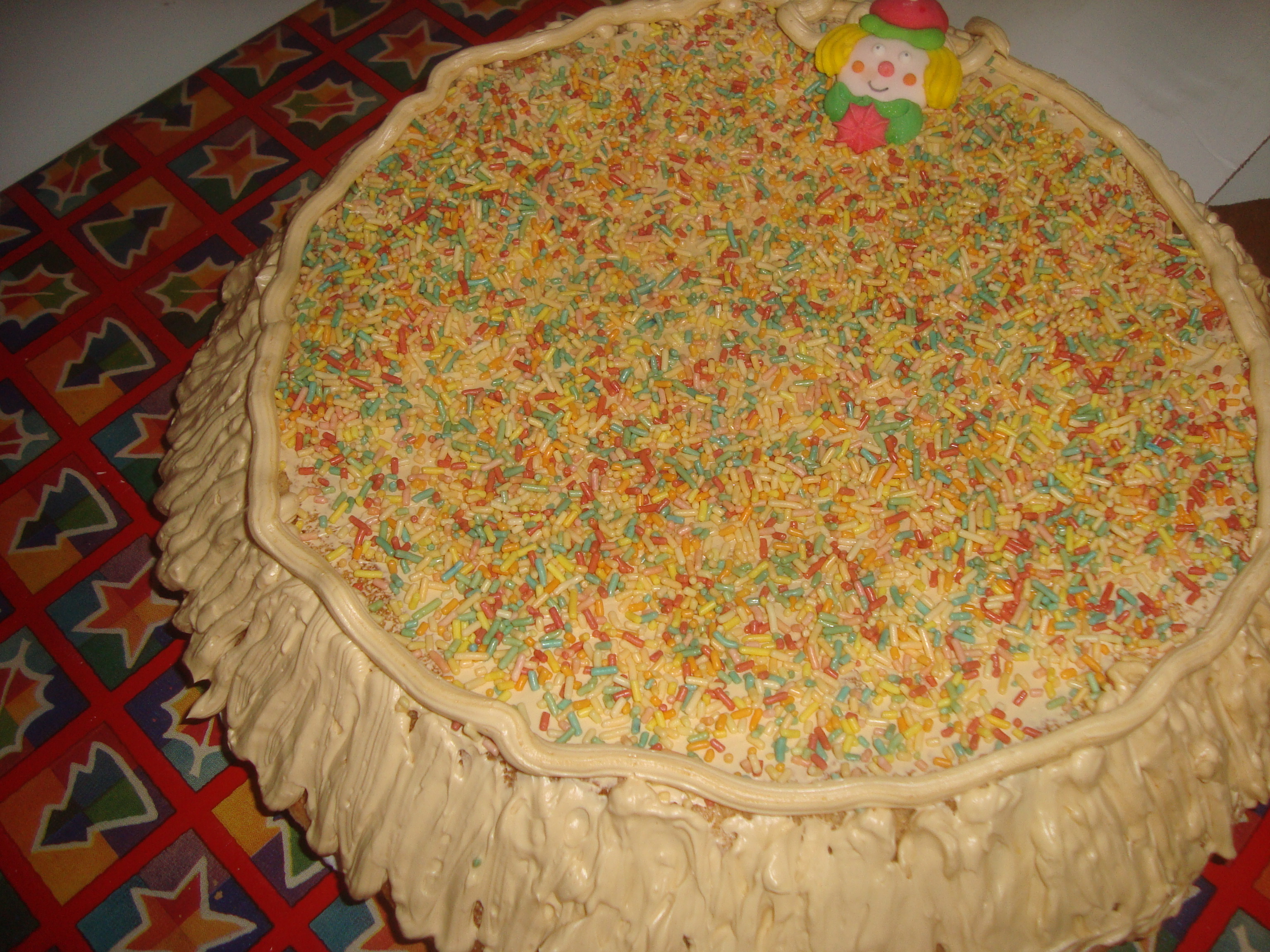 "Tortà" de almendras (Castellón, España) This photo has been taken in the country: Spain